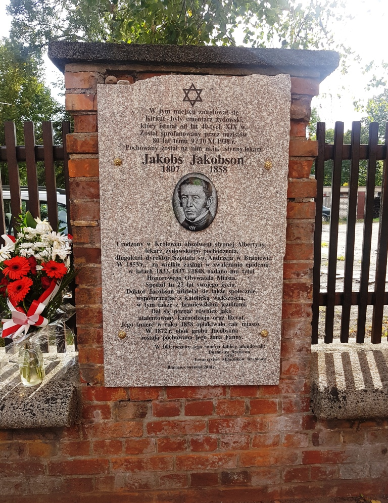 Jacob Jacobson - niemiecki lekarz pochodzenia żydowskiego praktykujący w Braniewie w latach 1831-1858. Zasłużony dla miasta, honorowy obywatel Braniewa. 21 września 2018 r. z inicjatywy Towarzystwa Miłośników Braniewa odsłonięta została na ogrodzeniu byłego kirkutu (naprzeciw Urzędu Miasta w Braniewie) płyta pamiątkowa poświęcona. Płyta została ufundowana w 160. rocznicę jego śmierci.